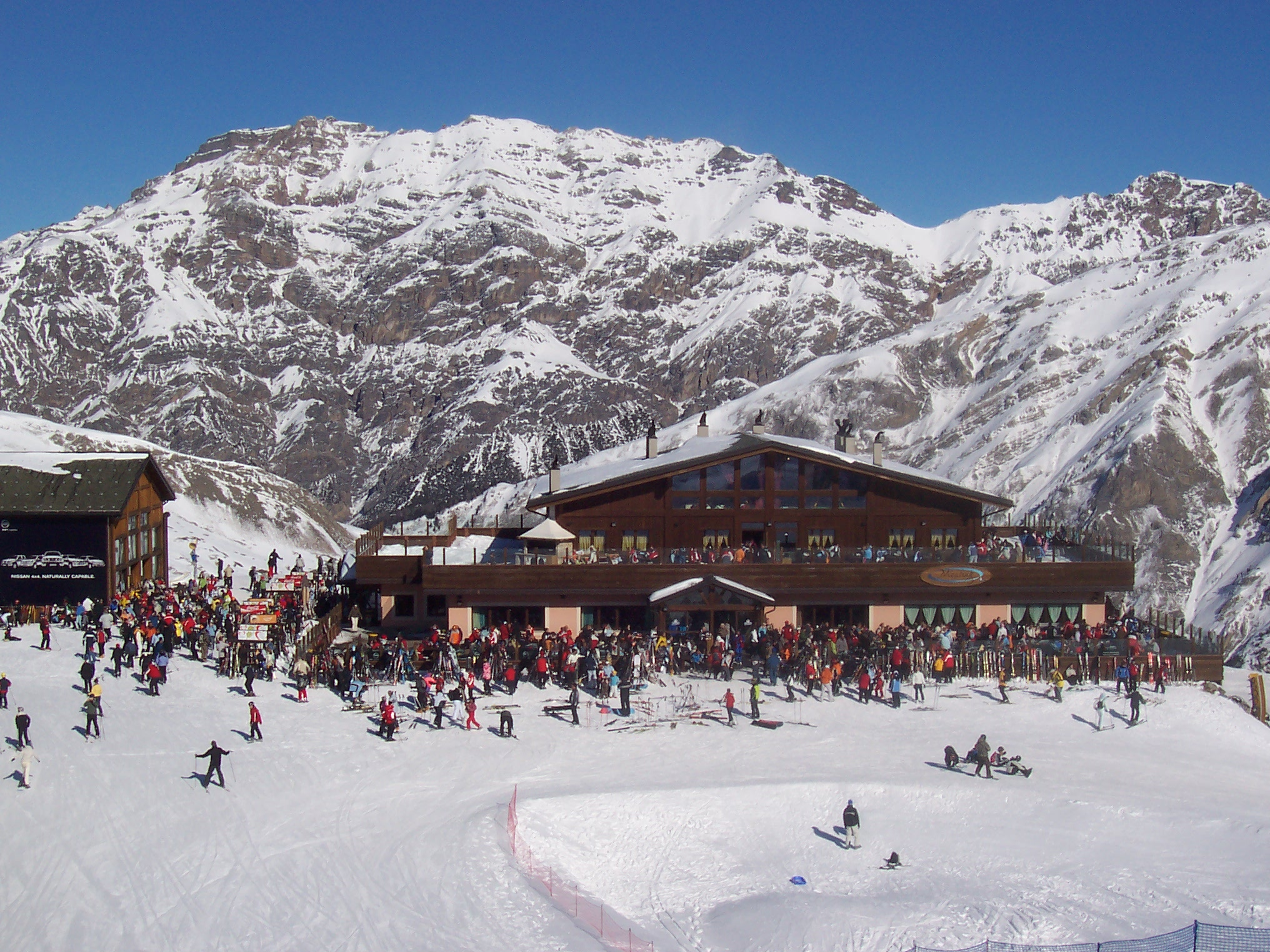 Livigno (Italy) 2007